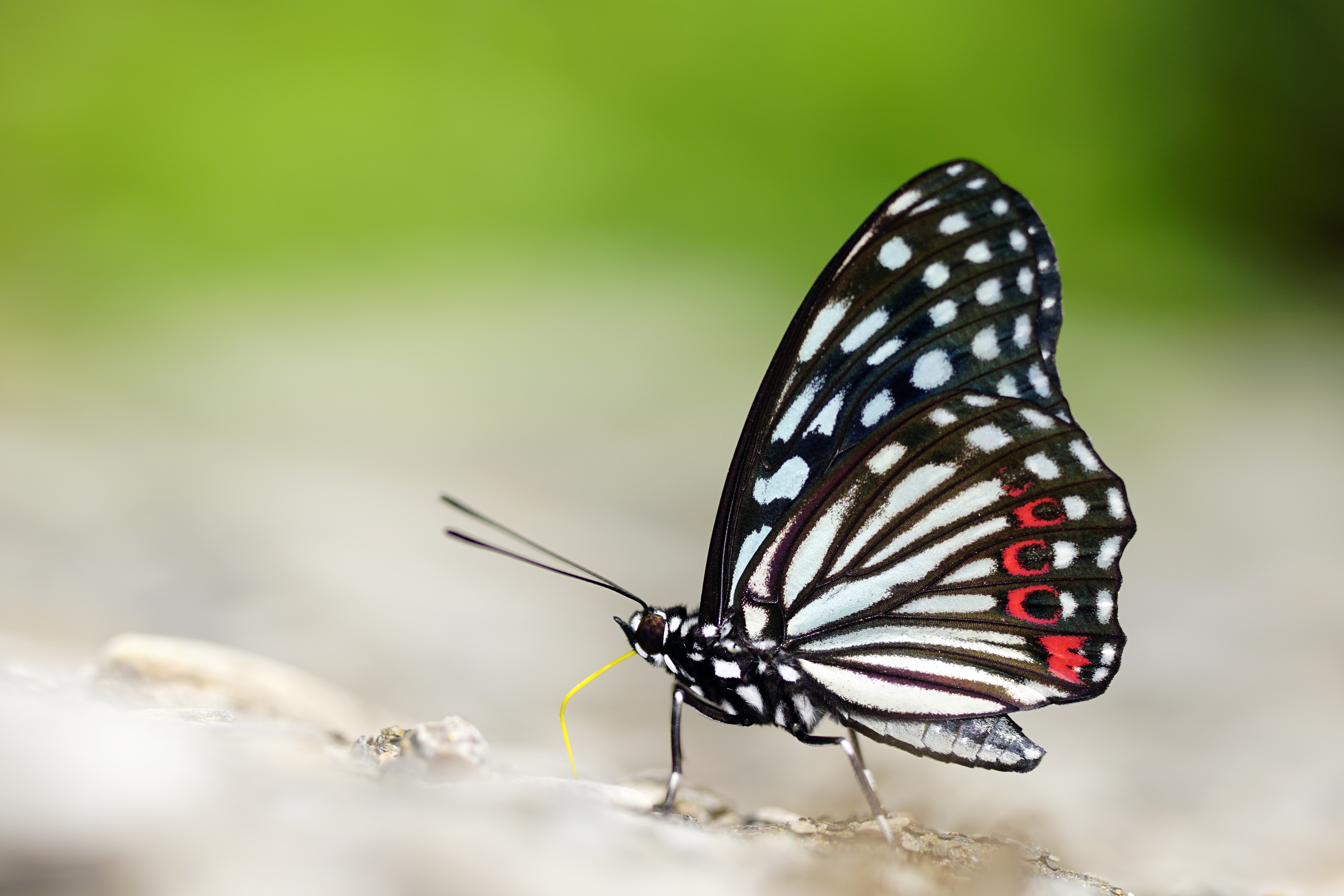 紅斑脈蛺蝶 Hestina assimilis formosana